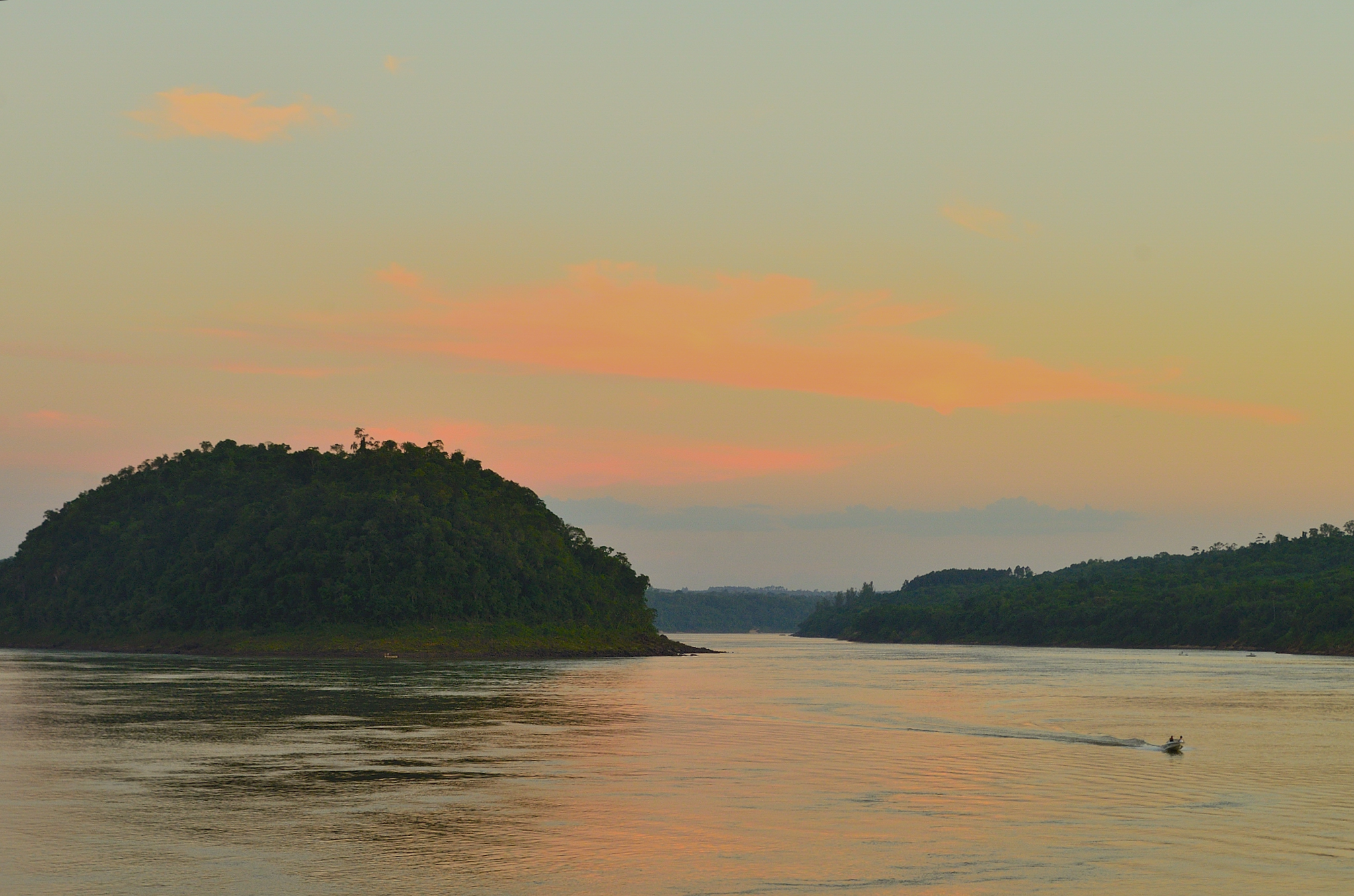 Montecarlo, Misiónes, Argentina